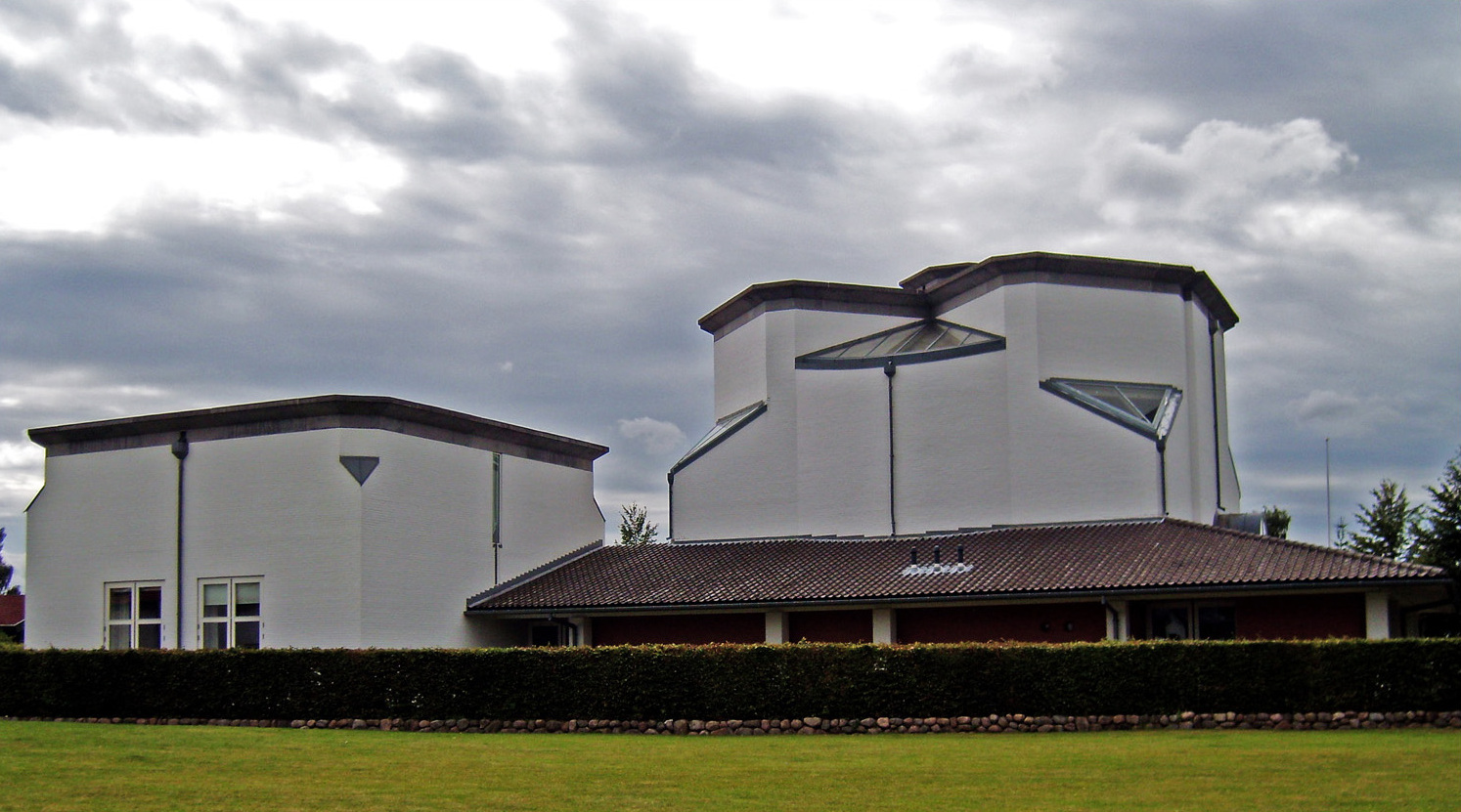 fra øst